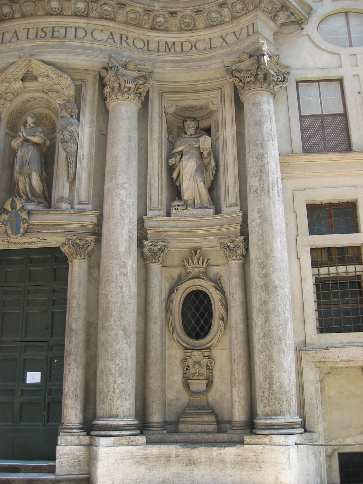 Francesco Borromini: San Carlo alle Quattro Fontane, Rom. Detalj av fasaden. Foto av Rickard Lamré 2004-06-10.